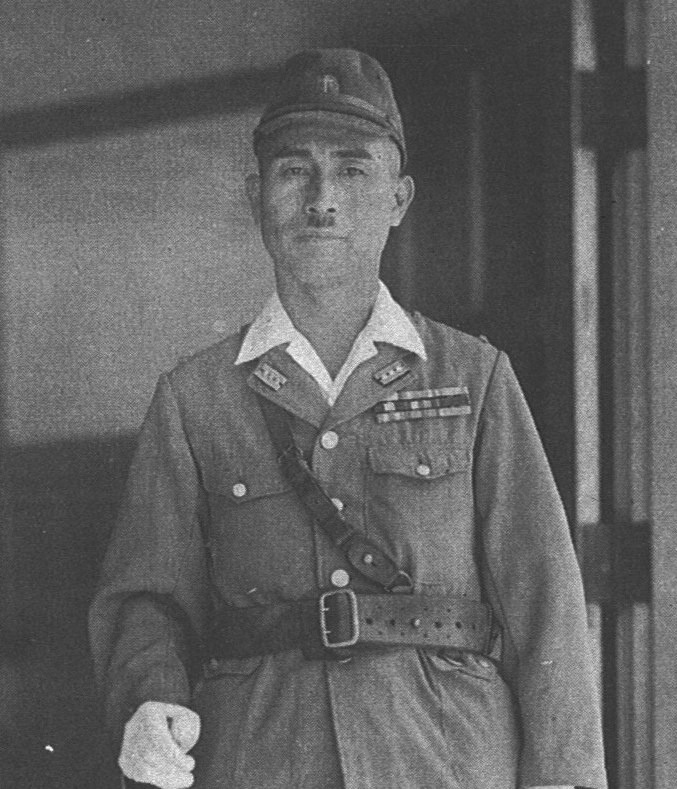 台南空司令時代の斎藤正久。